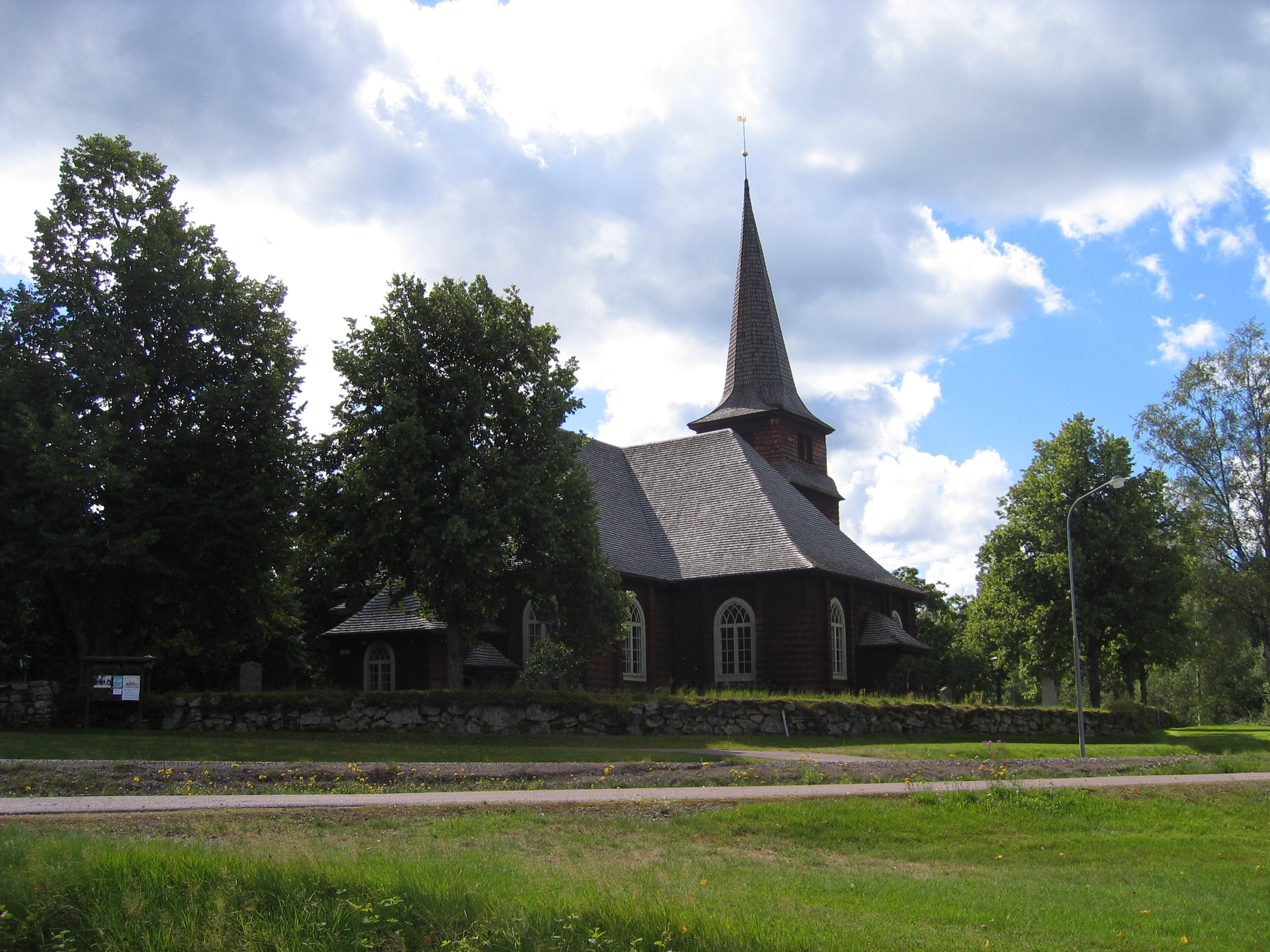 Östmarks kyrka (Värmland, Sverige)